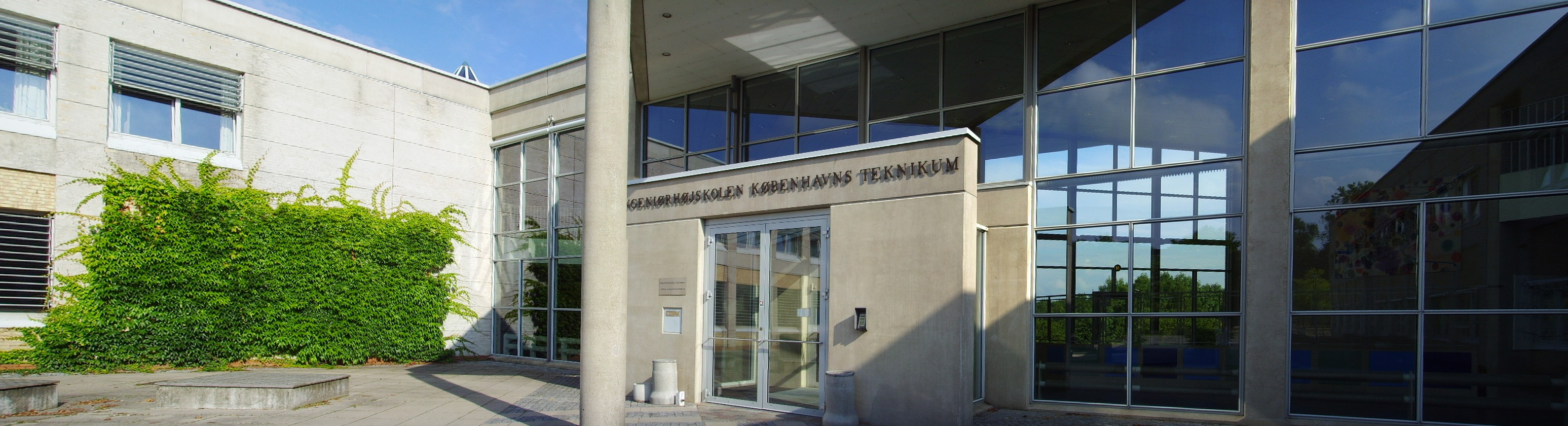 Engineering College of Copenhagen (Ingeniørhøjskolen i København) in the Ballerup suburb of Copenhagen, Denmark